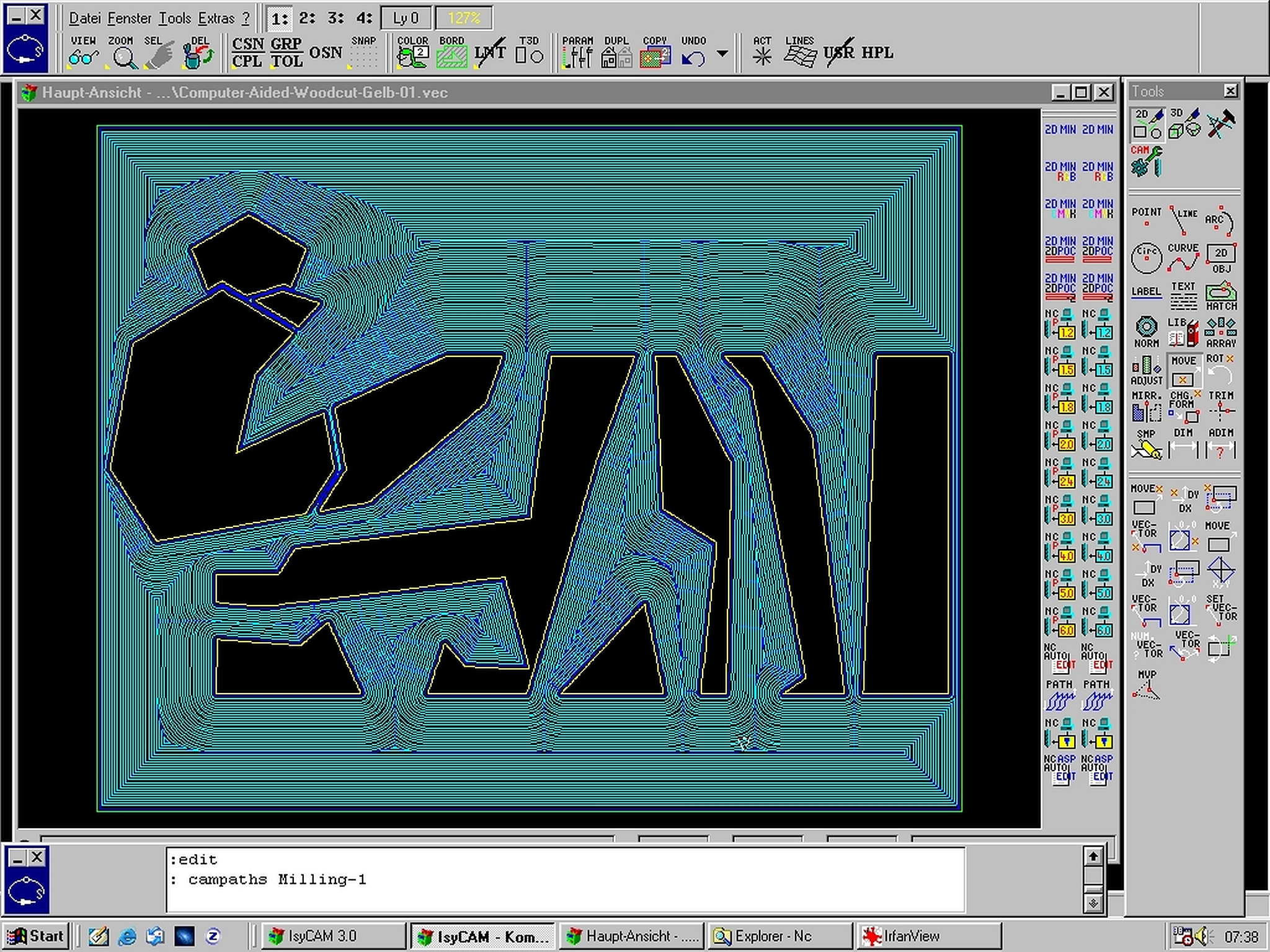 Dieses Bild zeigt einen Screenshot von Fräsbahnen für einen computerunterstützten Holzschnitt. Die hellblauen Bahnen haben einen Abstand von etwa 1,5 mm. Die Berechnung der Bahnen erfolgt mit einem CAD-Programm.